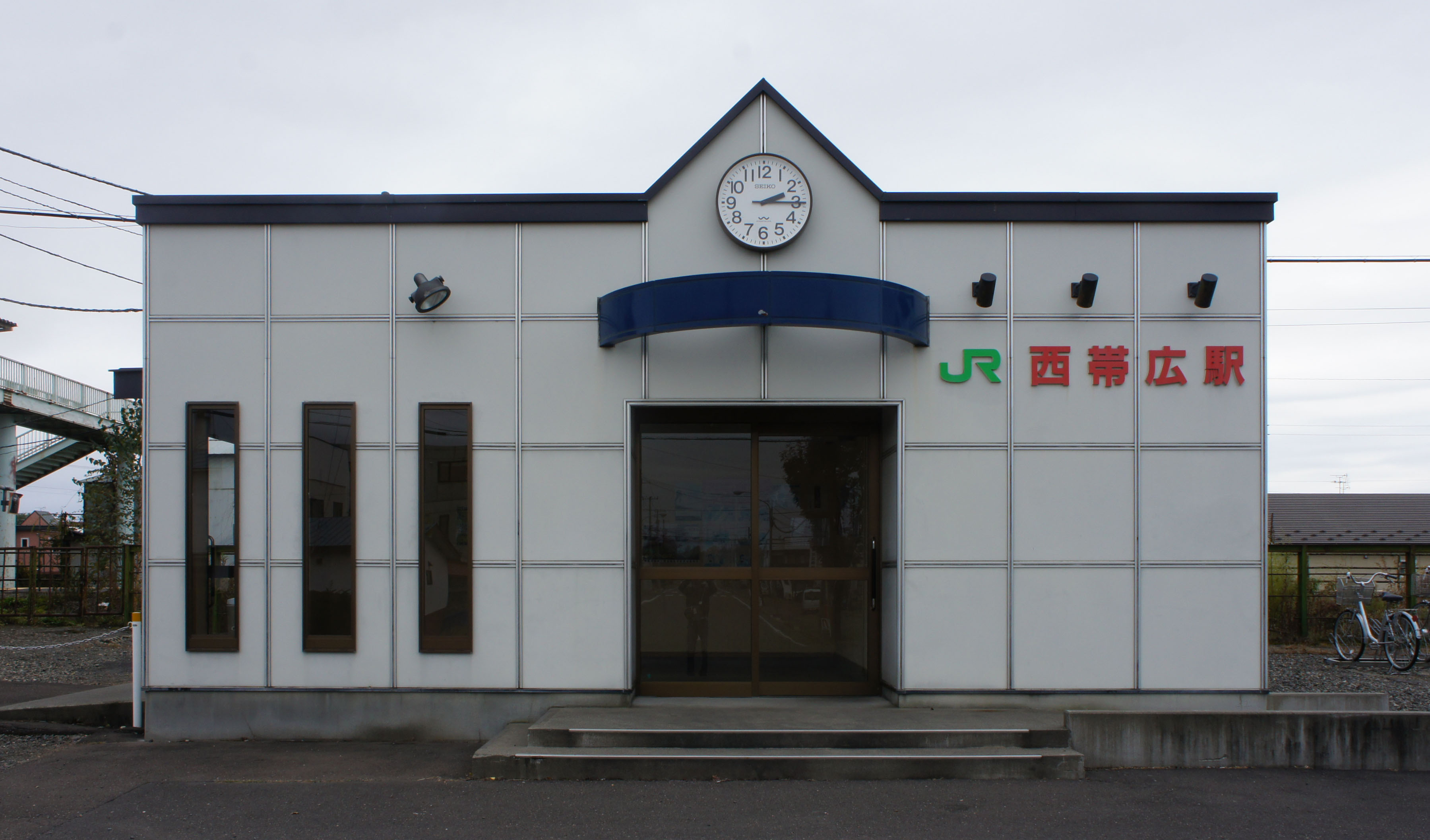 JR根室本線・西帯広駅の駅舎 Sony NEX-3